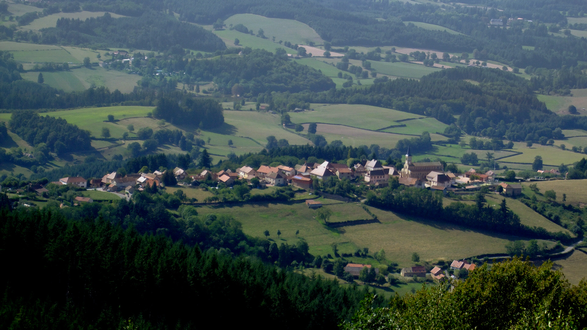 Village de Montmélard vue du Mont St-Cyr